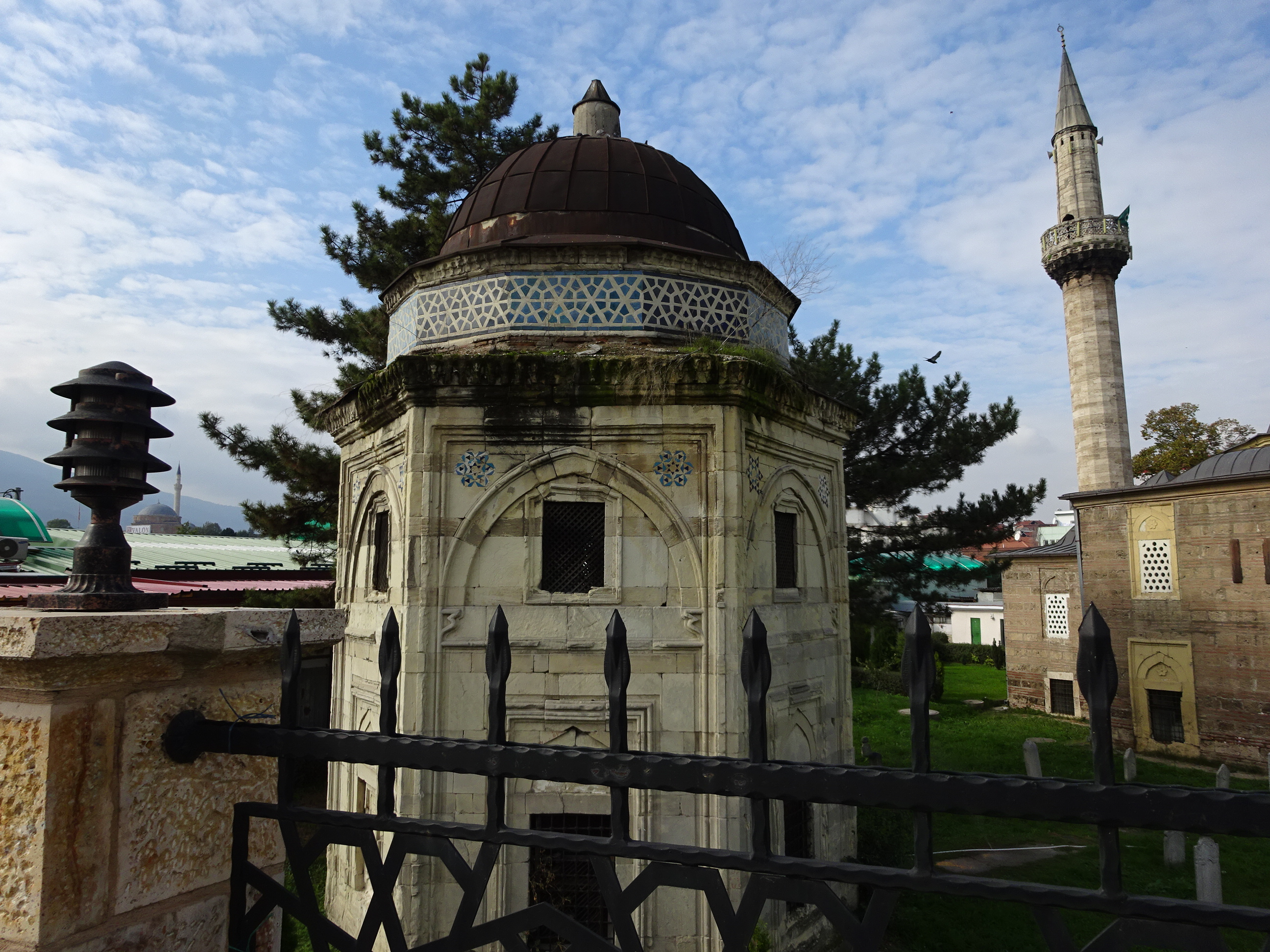 Исхак Бегова Џамија Скопје Ова е фотографија на споменик на културата во Македонија со типски код: A02This is a a photo of a cultural monument in North Macedonia with type id: A02